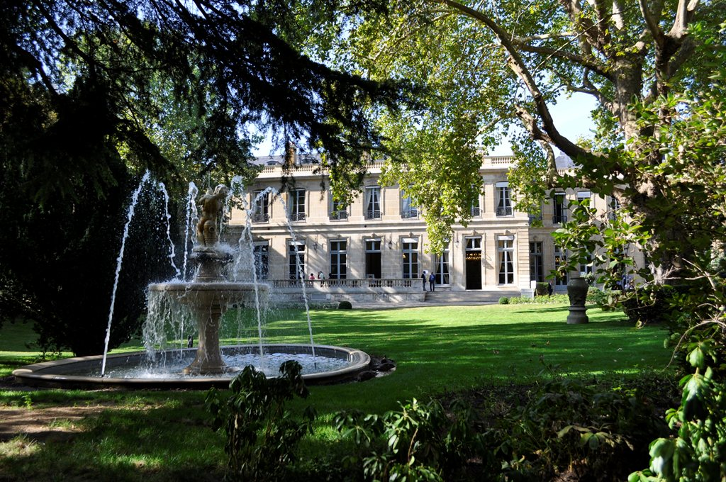 Façade sur jardin de l'hôtel de Roquelaure L'hôtel de Castries est situé au 246, boulevard Saint-Germain, dans le septième arrondissement de Paris. Cet bâtiment était traditionnellement affecté au ministère de l'Equipement avant de devenir le siège du cabinet du ministère de l'Ecologie et du Développement Durable. Photo prise lors des journées européennes du patrimoine 2012